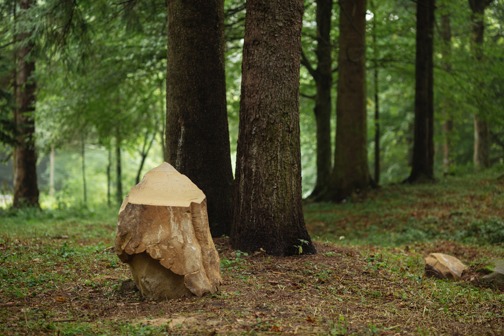 Detalhe da instalação Monumento a Euclides (2017) de Felippe Moraes retratando a pedra com inscrição do primeiro apontamento do livro "Os Elementos" de Euclides em inglês: "I - A point is that which has no parts". Foto de Adi Bulboaca